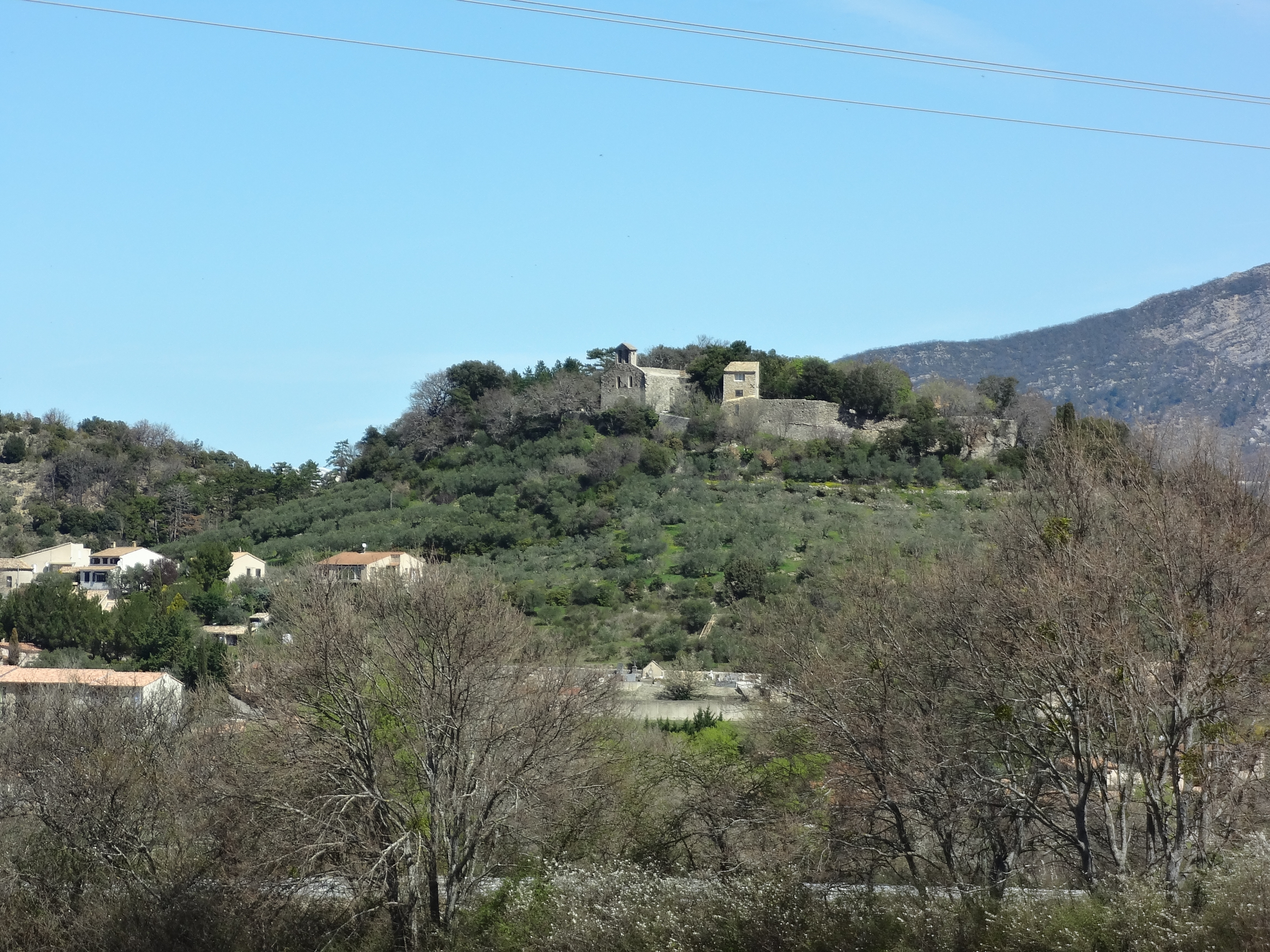 Le village de Peipin sur sa colline